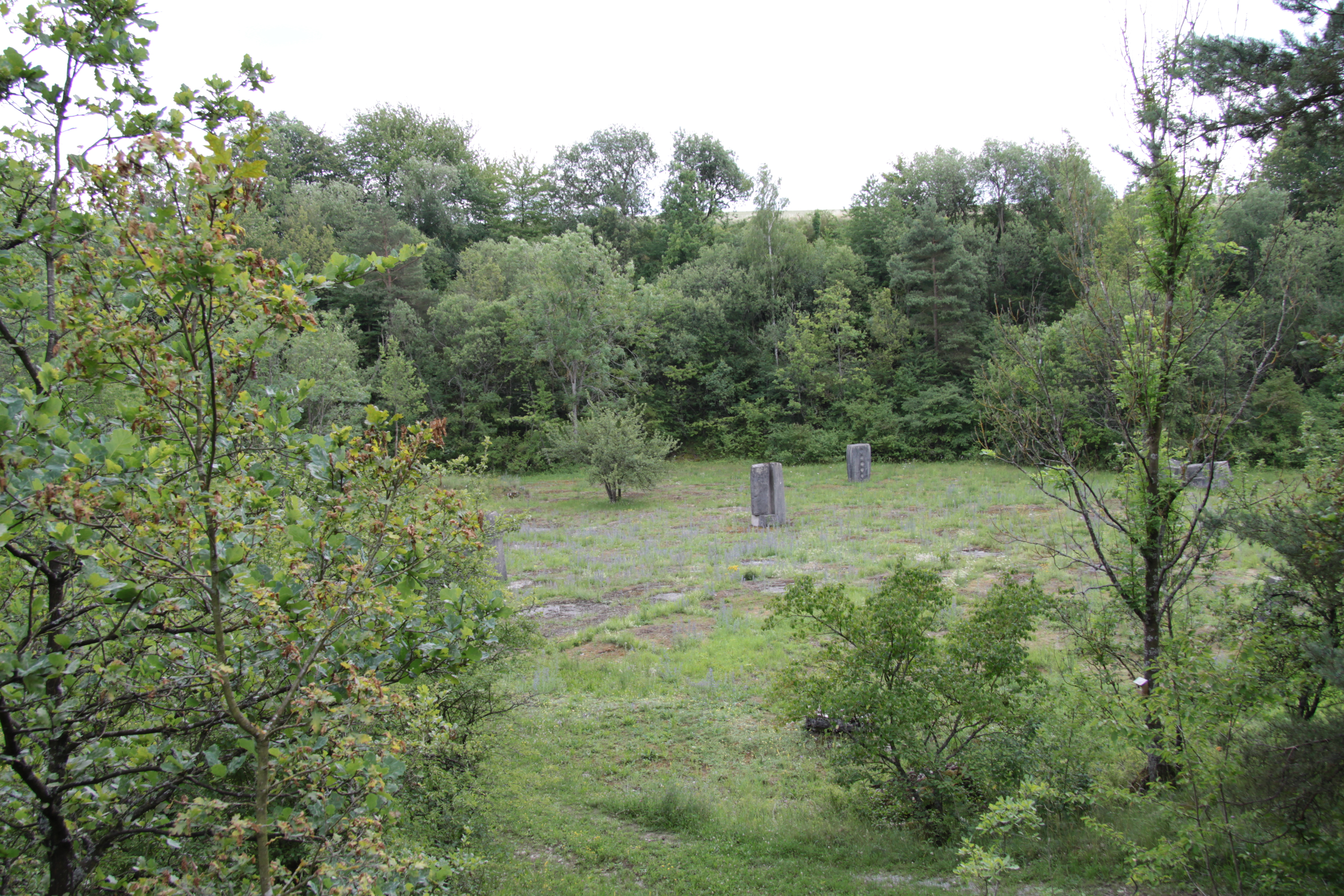 Gelände: Skulpturen 1. Steinbildhauersymposion Deutschlands